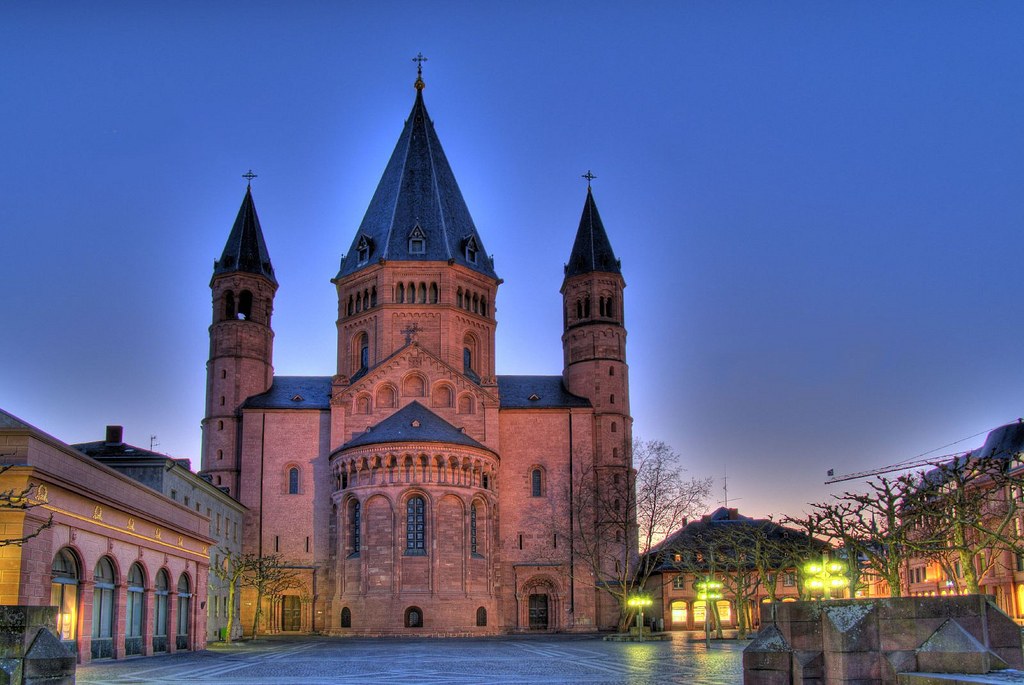 Ostchor und Ostquerhaus des Mainzer Doms. Der Mittelturm stammt aus dem Jahr 1875. Die unteren vier Geschosse der Flankentürme sind Reste des Willigis-Baus.